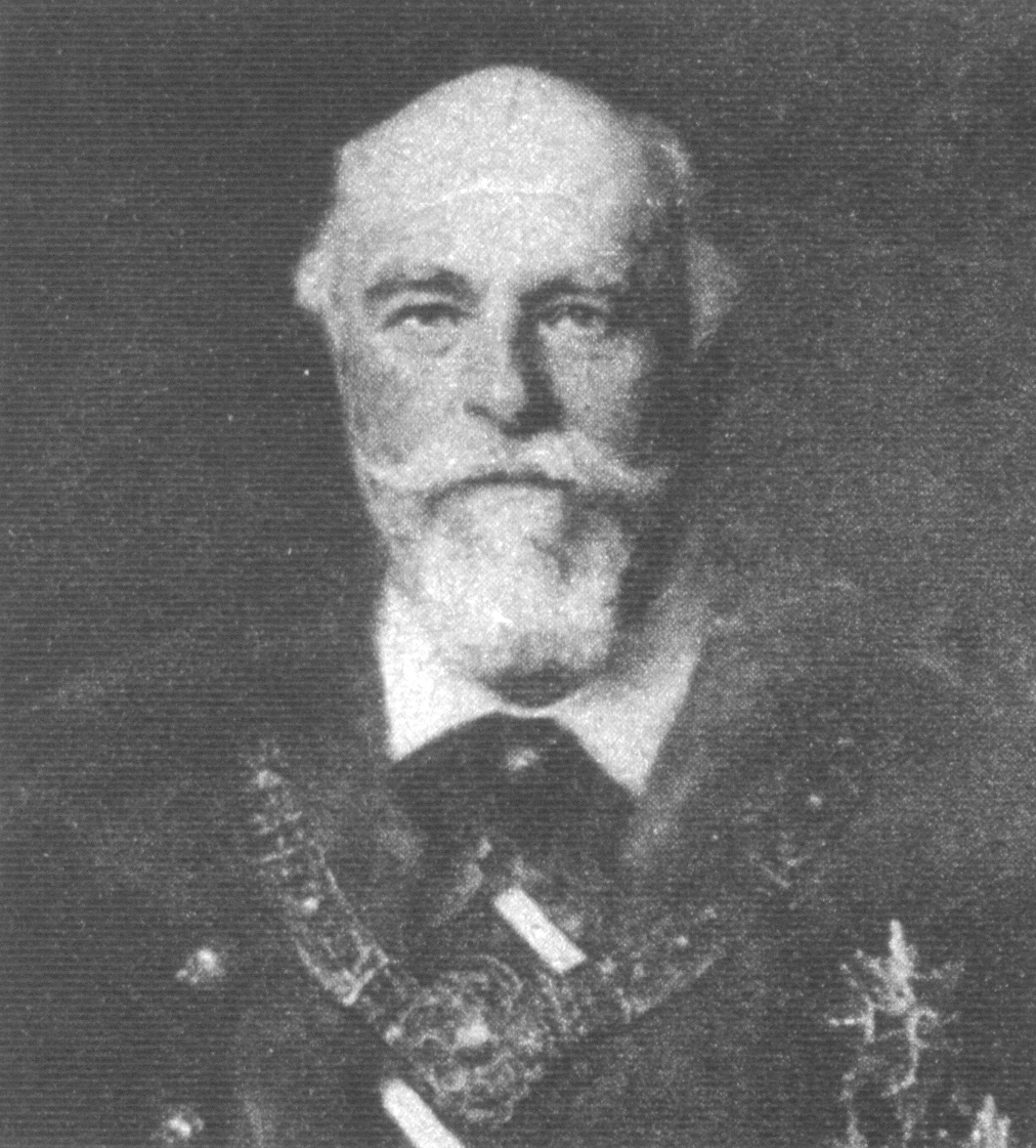 Darányi Ignác földművelődésügyi miniszter. Festette Balló Ede.